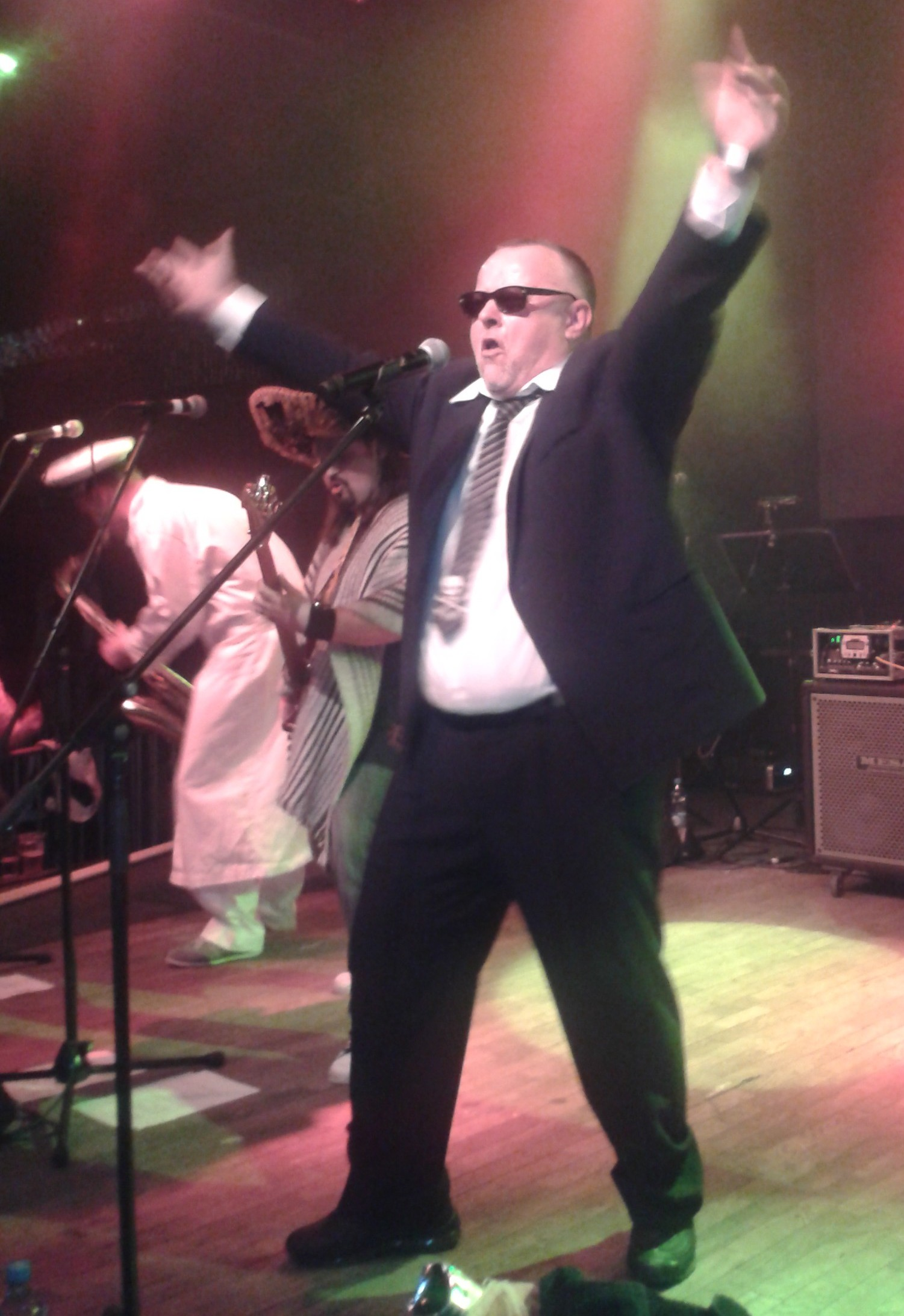 Petr Pečený při křtu alba Zdravý doktor v dubnu 2013, Lucerna Music bar